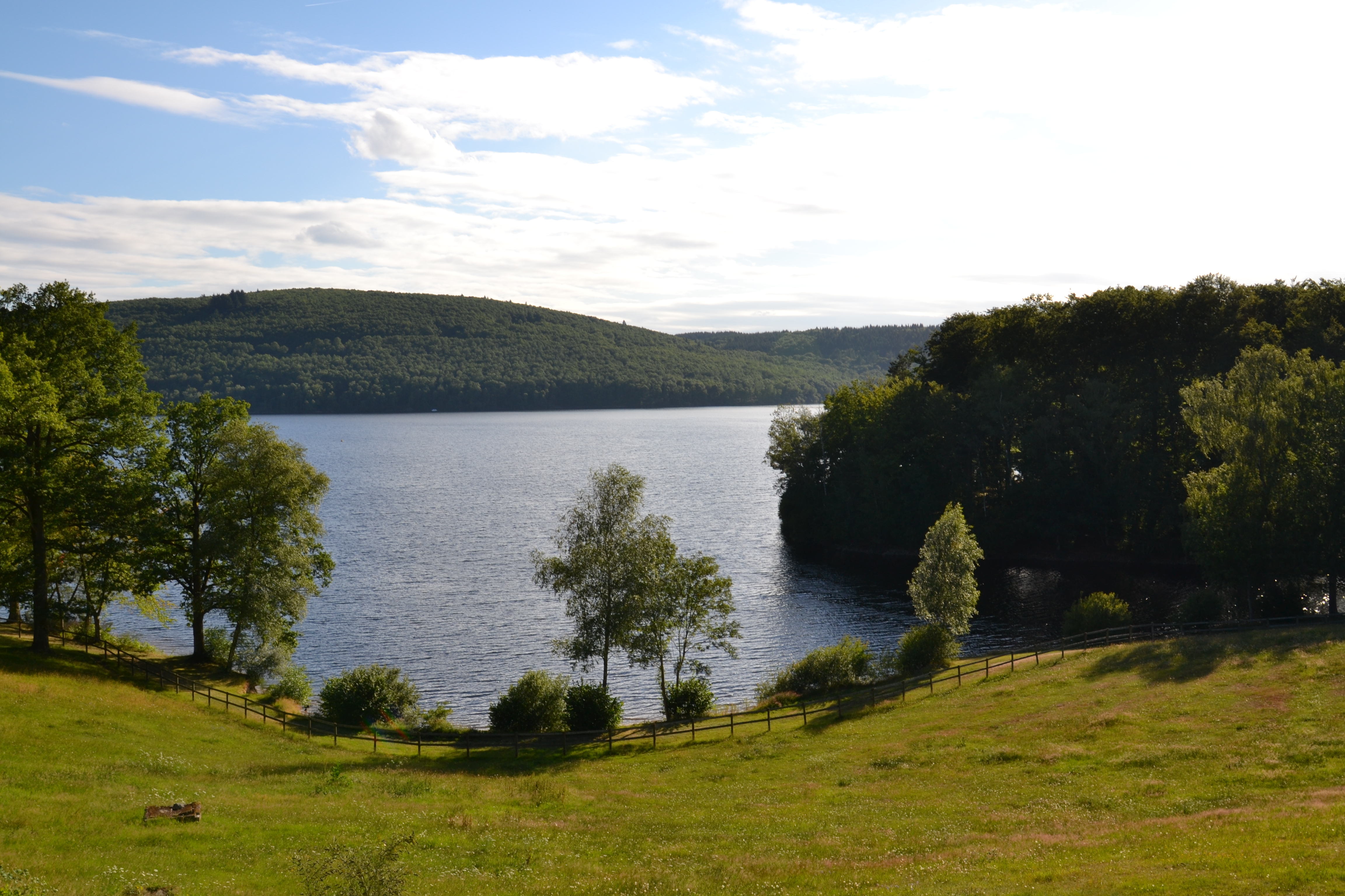 Vue du lac de Vassivière depuis l'île du même nom (Haute-Vienne, France)